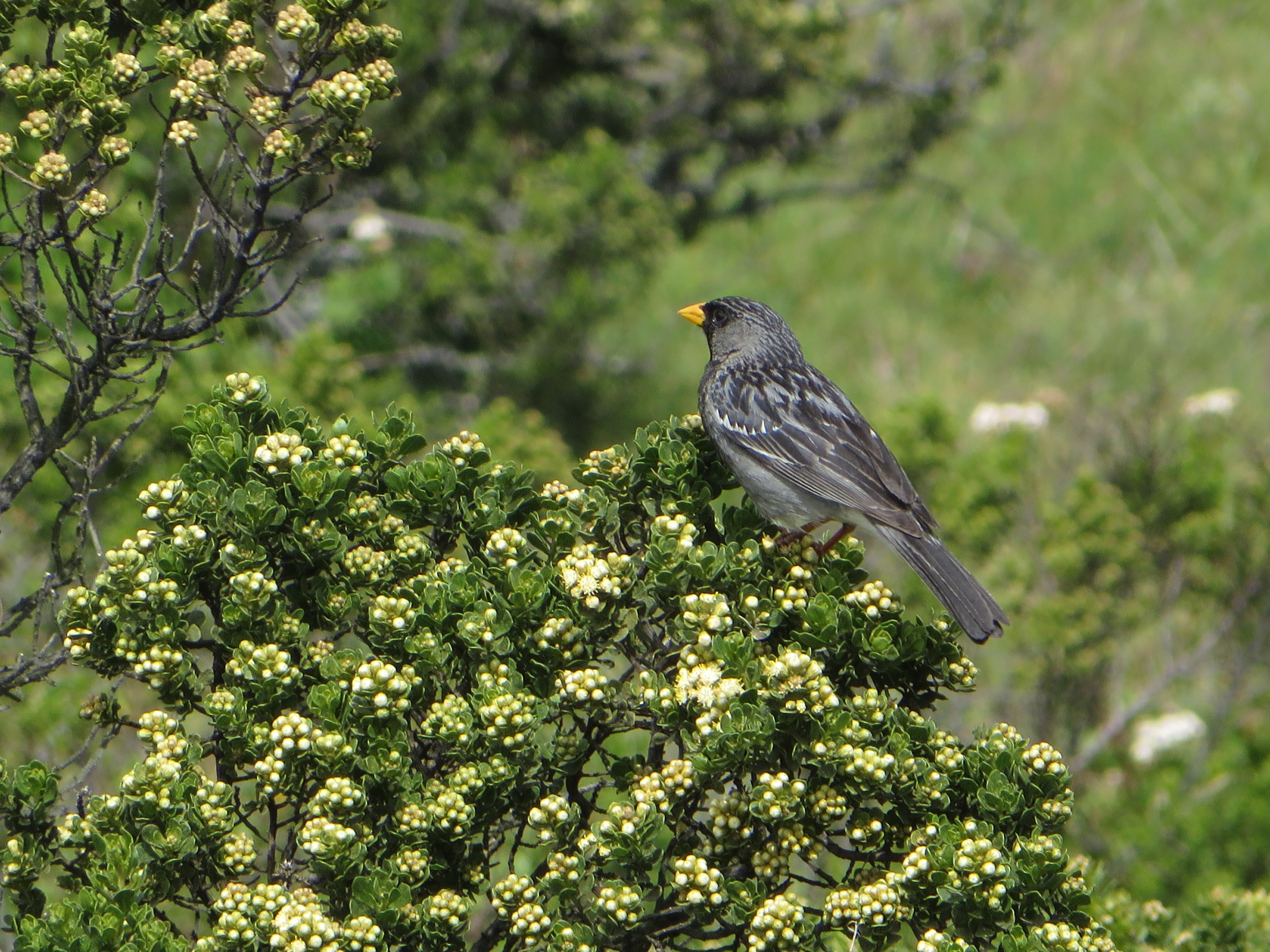 Phrygilus fruticeti, fotografiado en las alturas de Marachanca, Matucana, Lima, Perú, en la quebrada izquierda de la Laguna Arca a 3700 metros sobre el nivel del mar